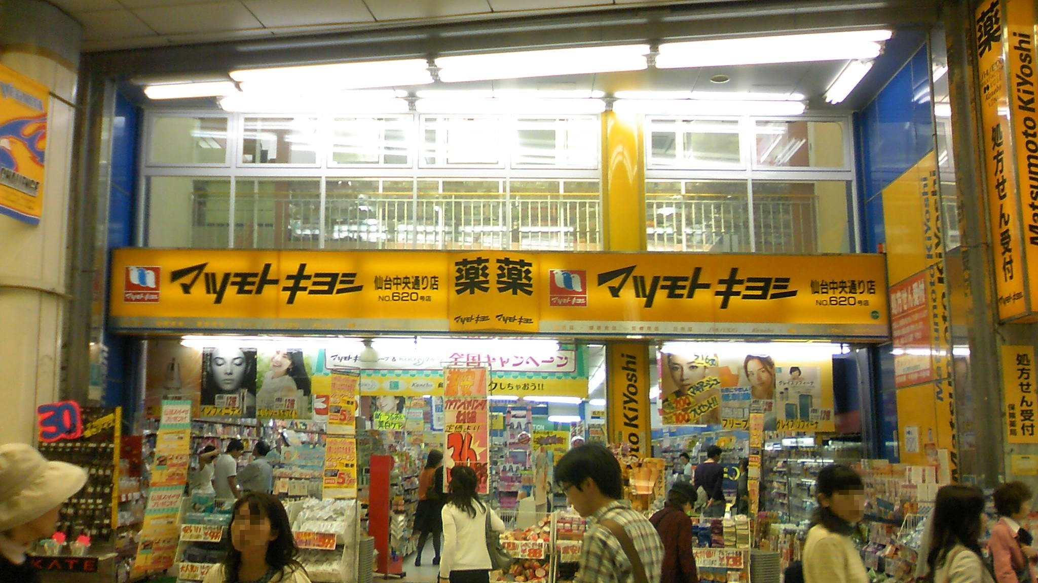 マツモトキヨシ仙台中央通り店